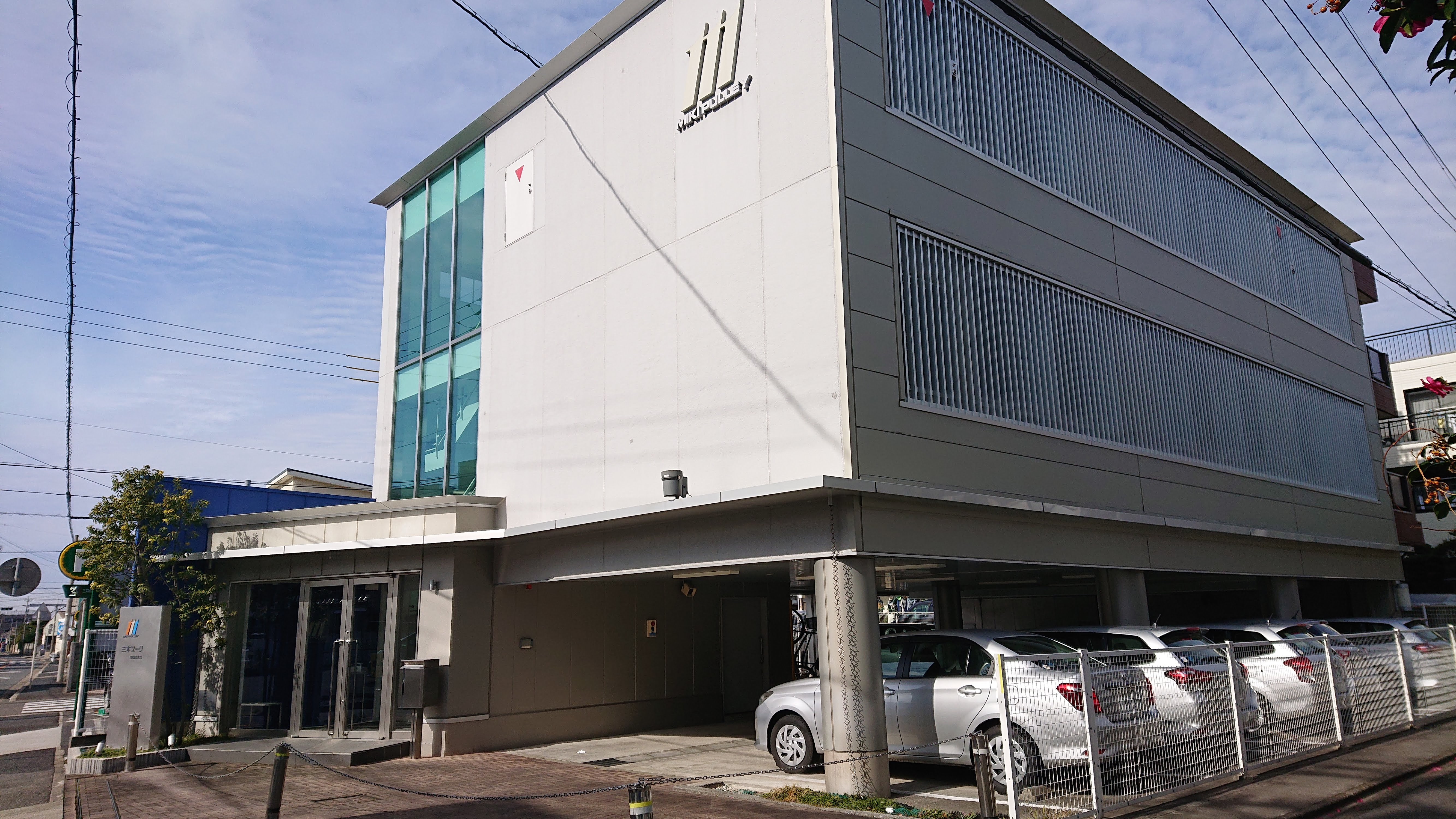 三木プーリ名古屋支店